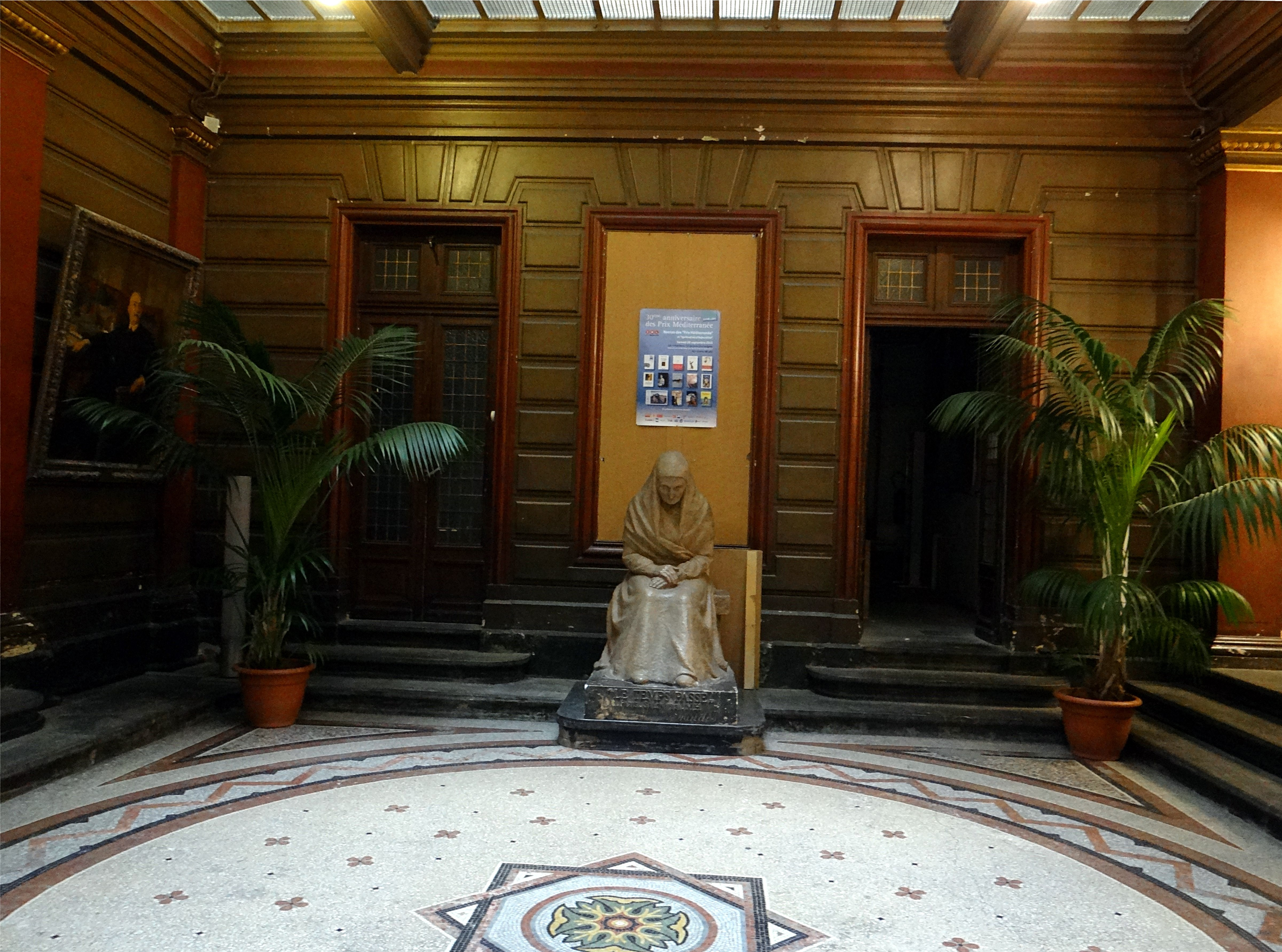 Vestibule de l' hôtel Pams, Perpignan, Pyrénées-Orientales, France. This building is en partie classé, en partie inscrit au titre des Monuments Historiques.